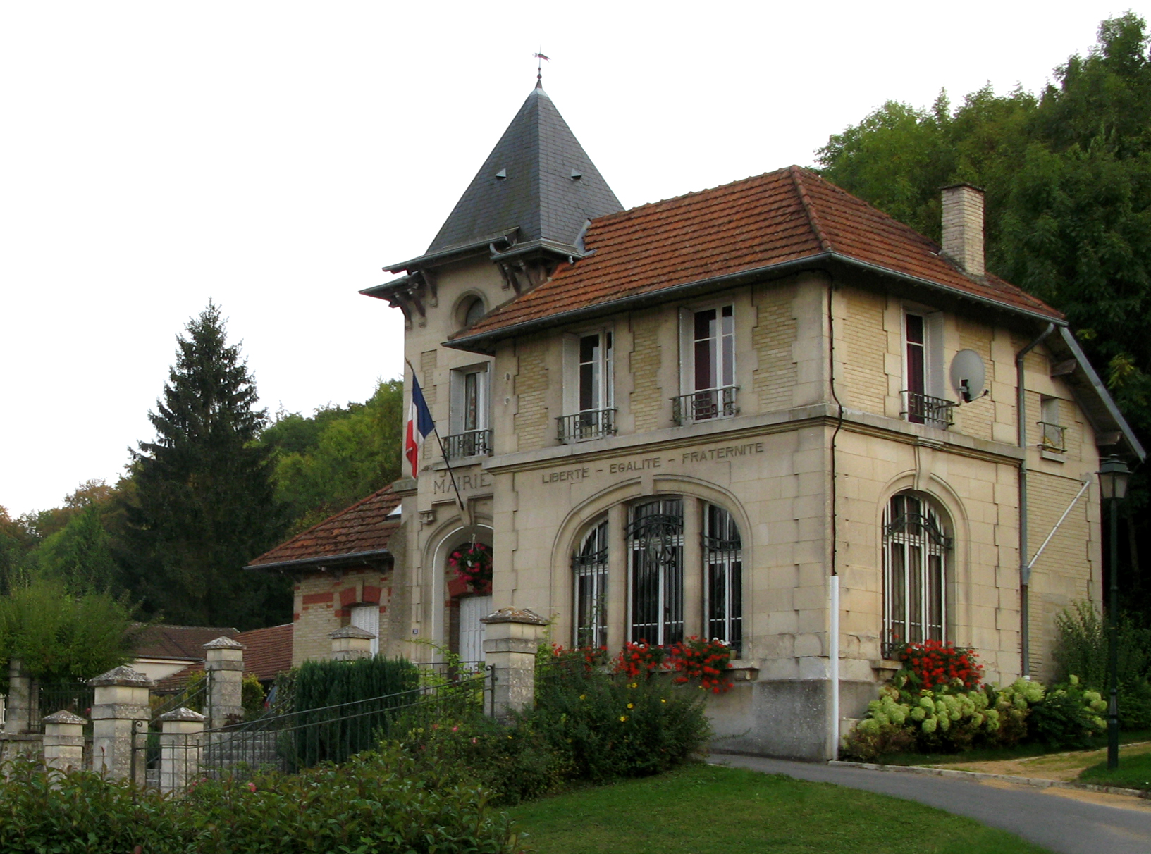 Saint-Bandry (Aisne, France) - La mairie. . .